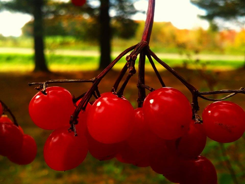 Fruit du viorne trifloré en automne